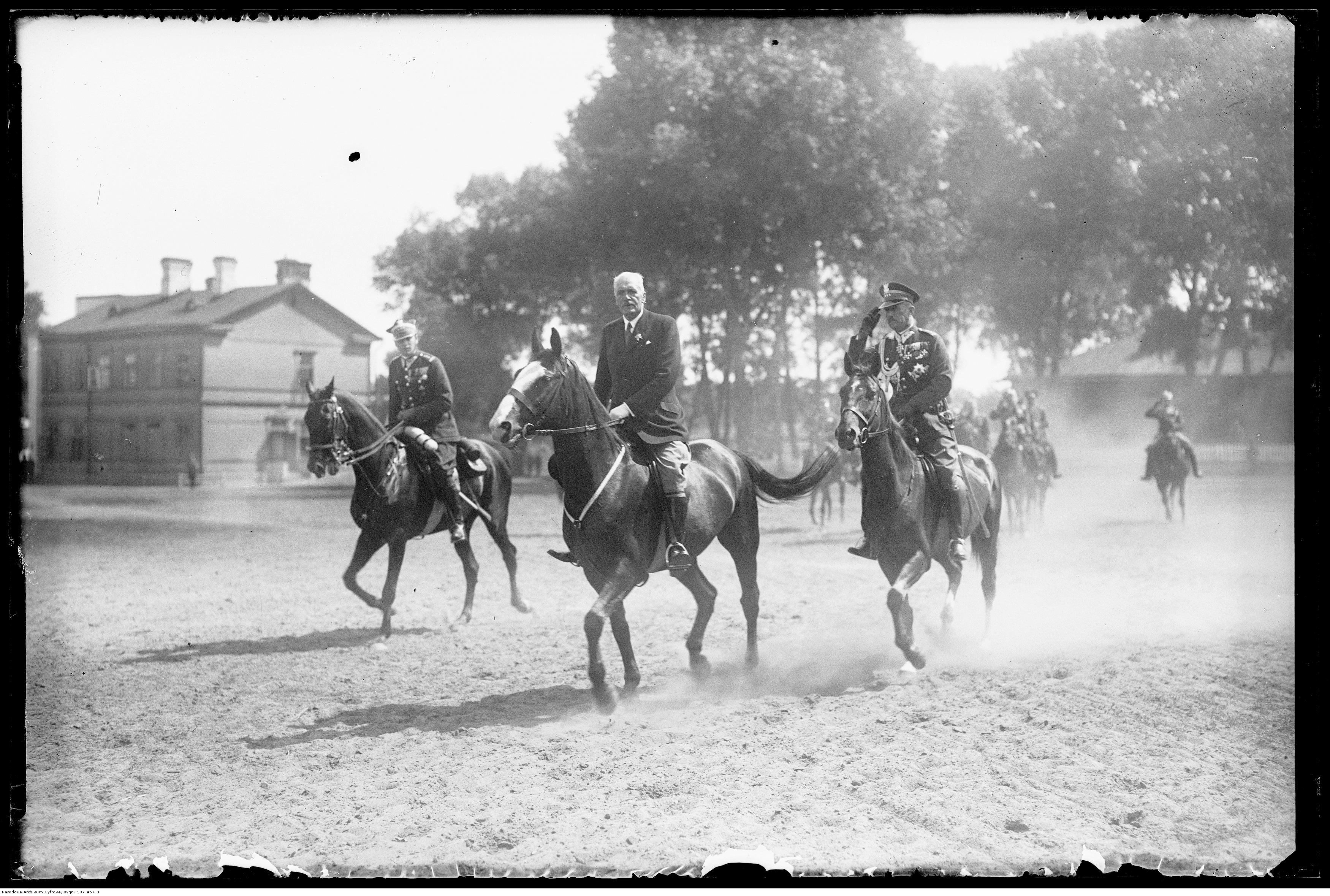 Prezydent RP Ignacy Mościcki w czasie przemarszu przed frontem.